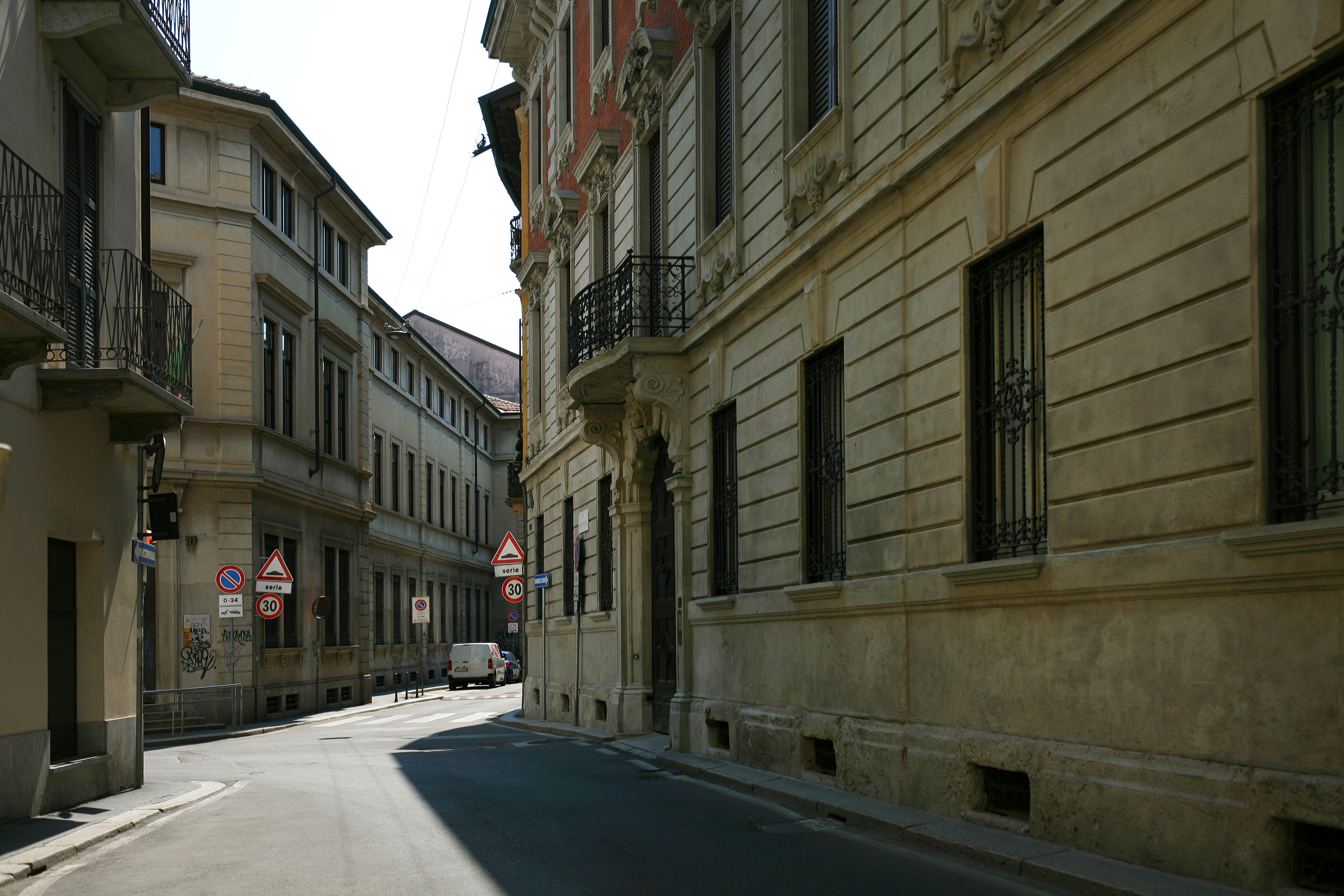 Scorcio di via Cappuccio a Milano con palazzi a lato